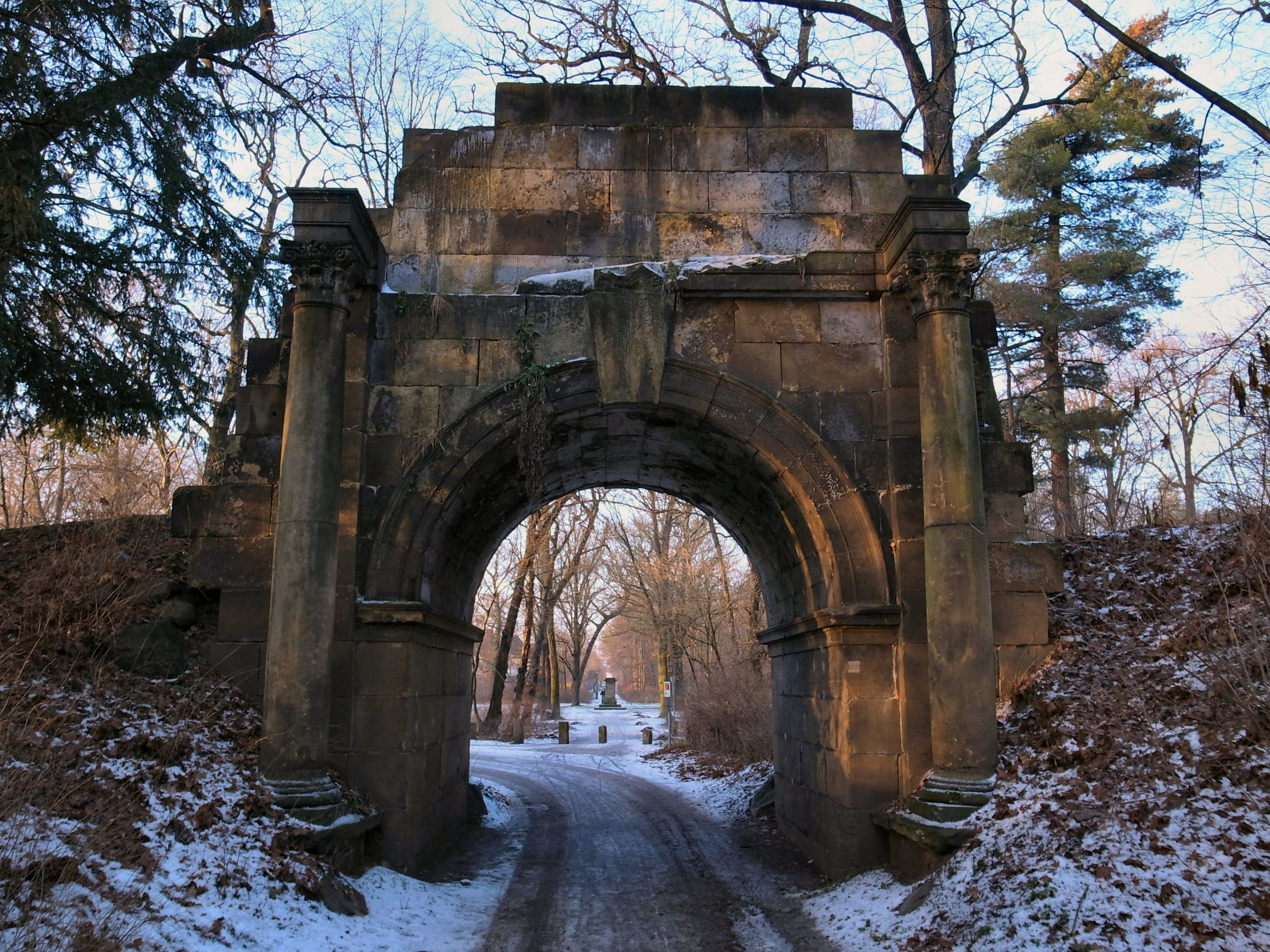 Dessau, Georgium, der Triumphbogen, Übergang vom Georgium in den Park "Beckerbruch"